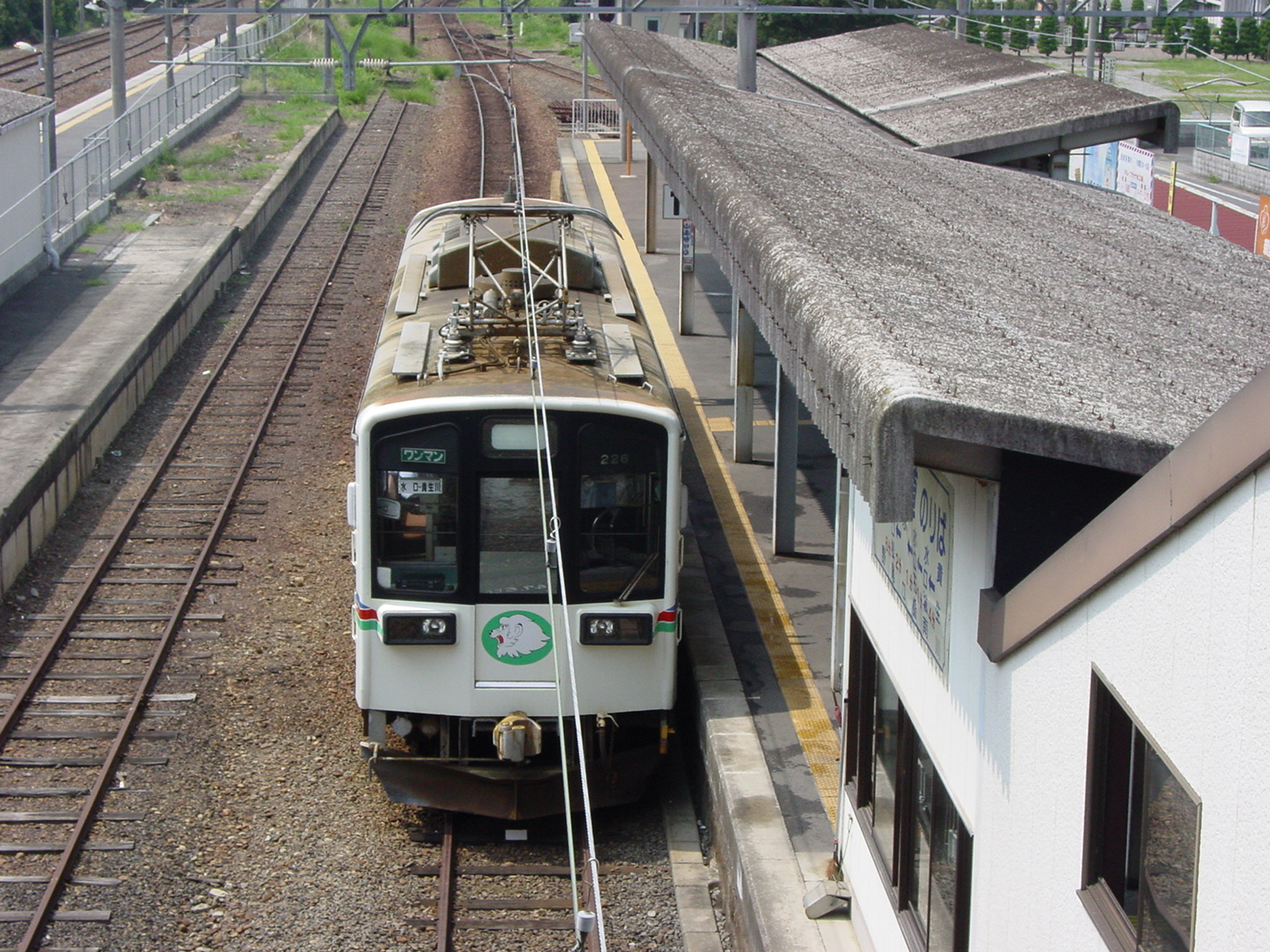 貴生川駅に停車中のja:近江鉄道の列車。